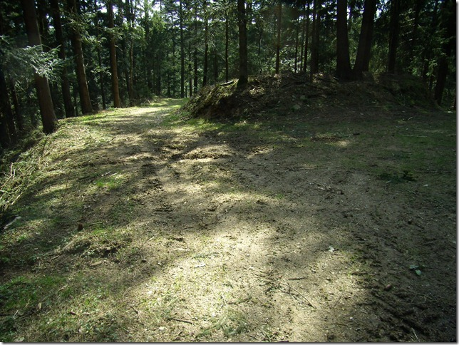 Zerstörung des Burgstalles Erlach durch eine "Forstautobahn"